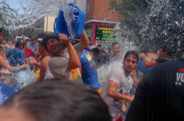 Instantánea de la celebración de la Batalla naval de Vallecas